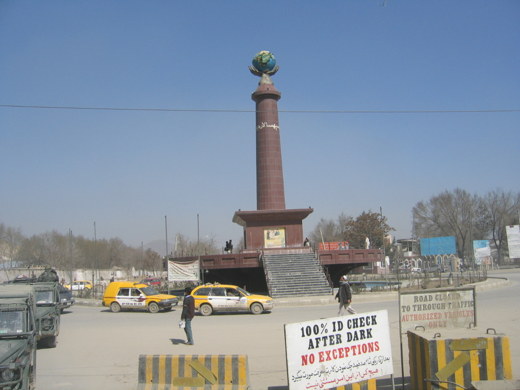 Massoud cirkle